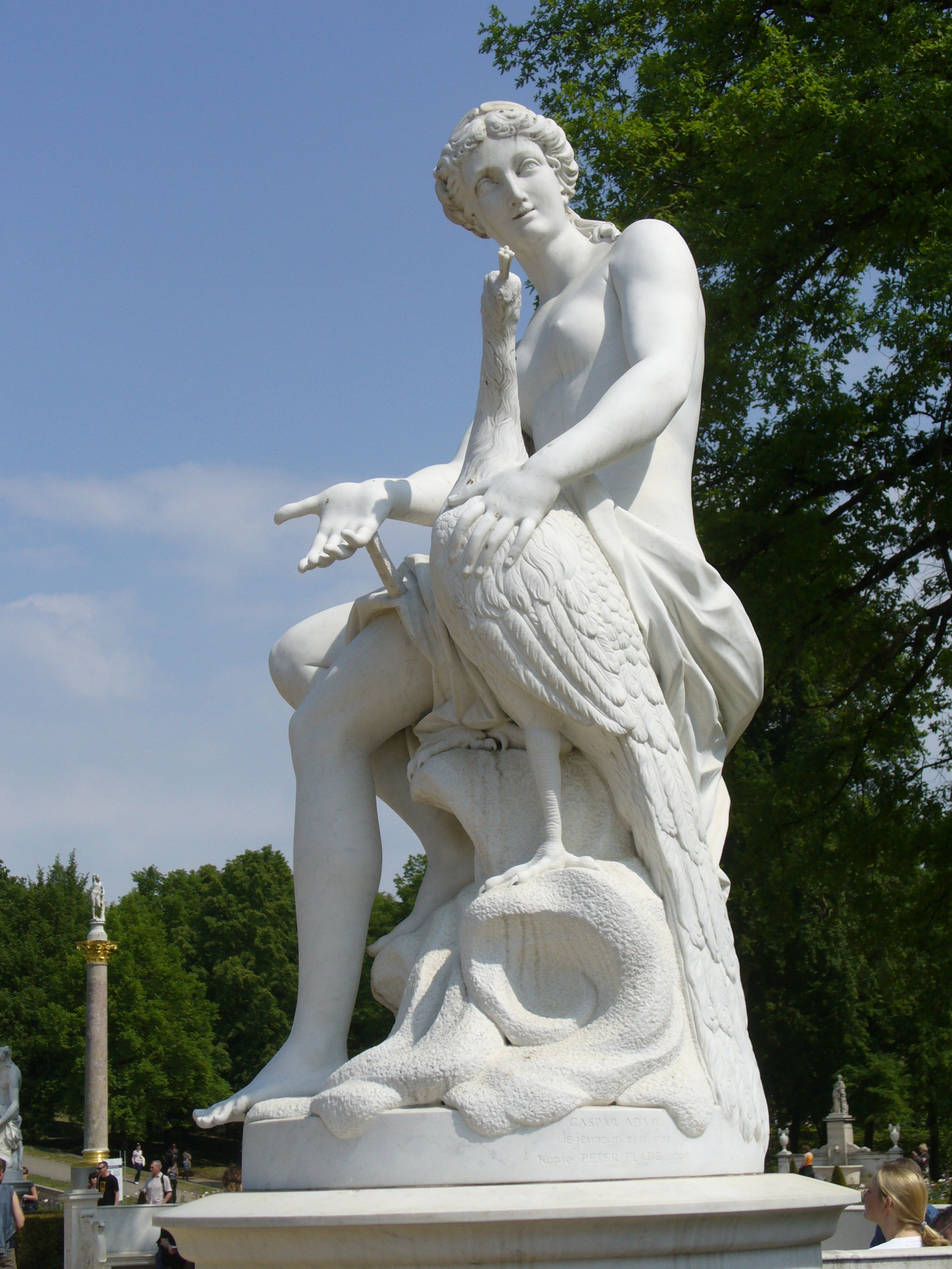 Göttin Juno mit Pfau-Francois Gaspard Adam(1753)-Französisches Rondell Sanssouci